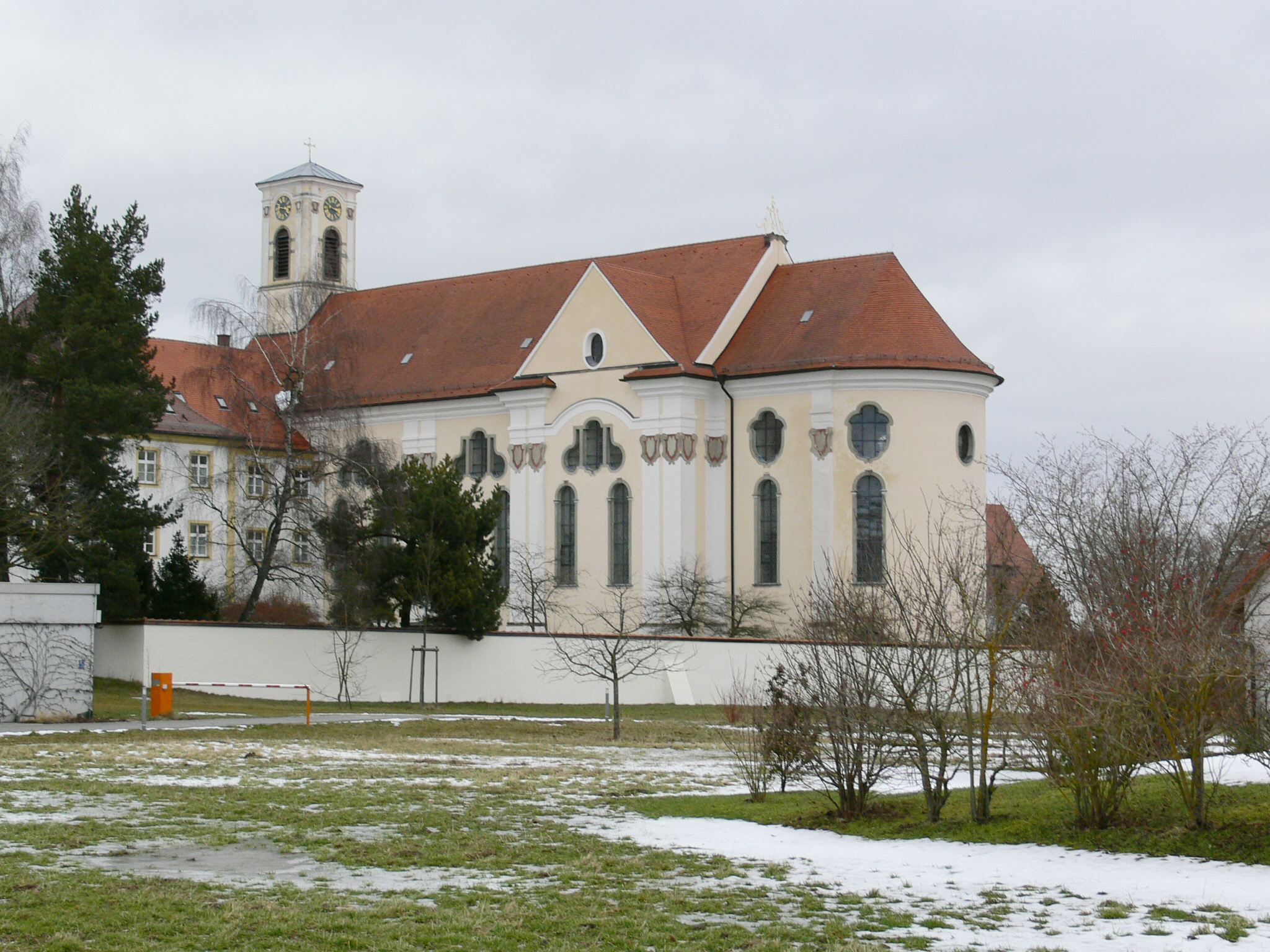 Bad Saulgau, Kloster Sießen, Klosterkirche